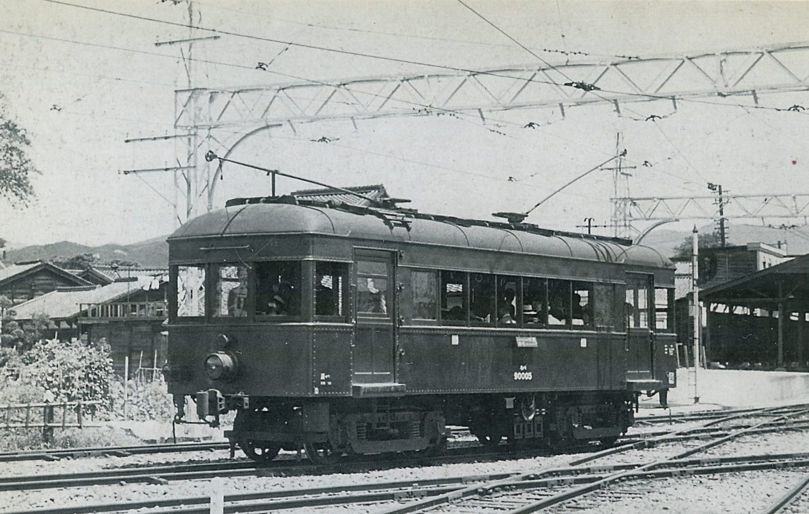 旧広浜鉄道8(当初4)、撮影当時鉄道省モハ90形モハ90005、後の熊本電気鉄道モハ71。可部線横川駅構内。